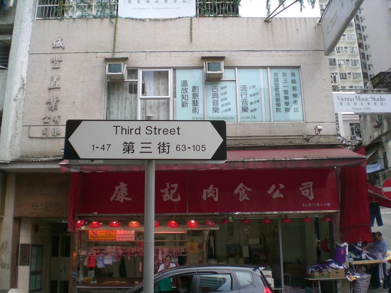 第三街